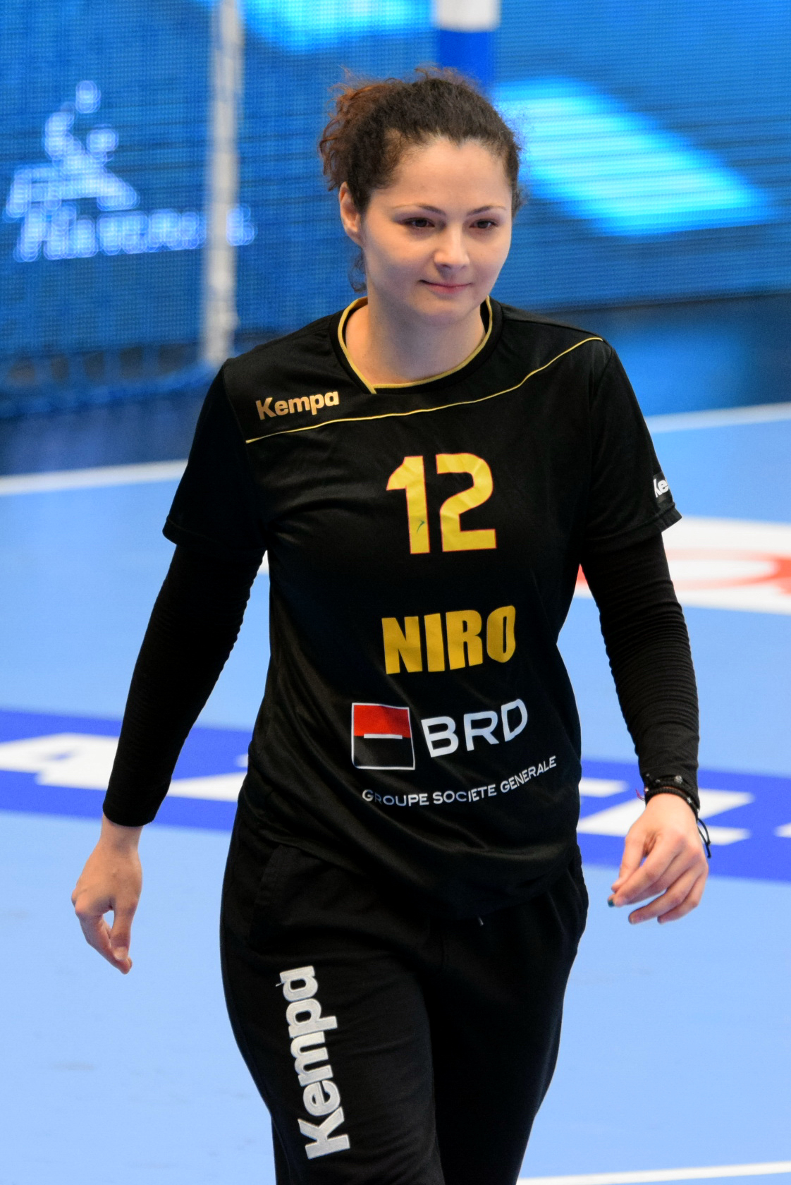 Ionica Munteanu Le 29 novembre 2015, lors du match Roumanie / Cuba pour le compte du TIPIFF 2015. Au stade Pierre de Coubertin à Paris.